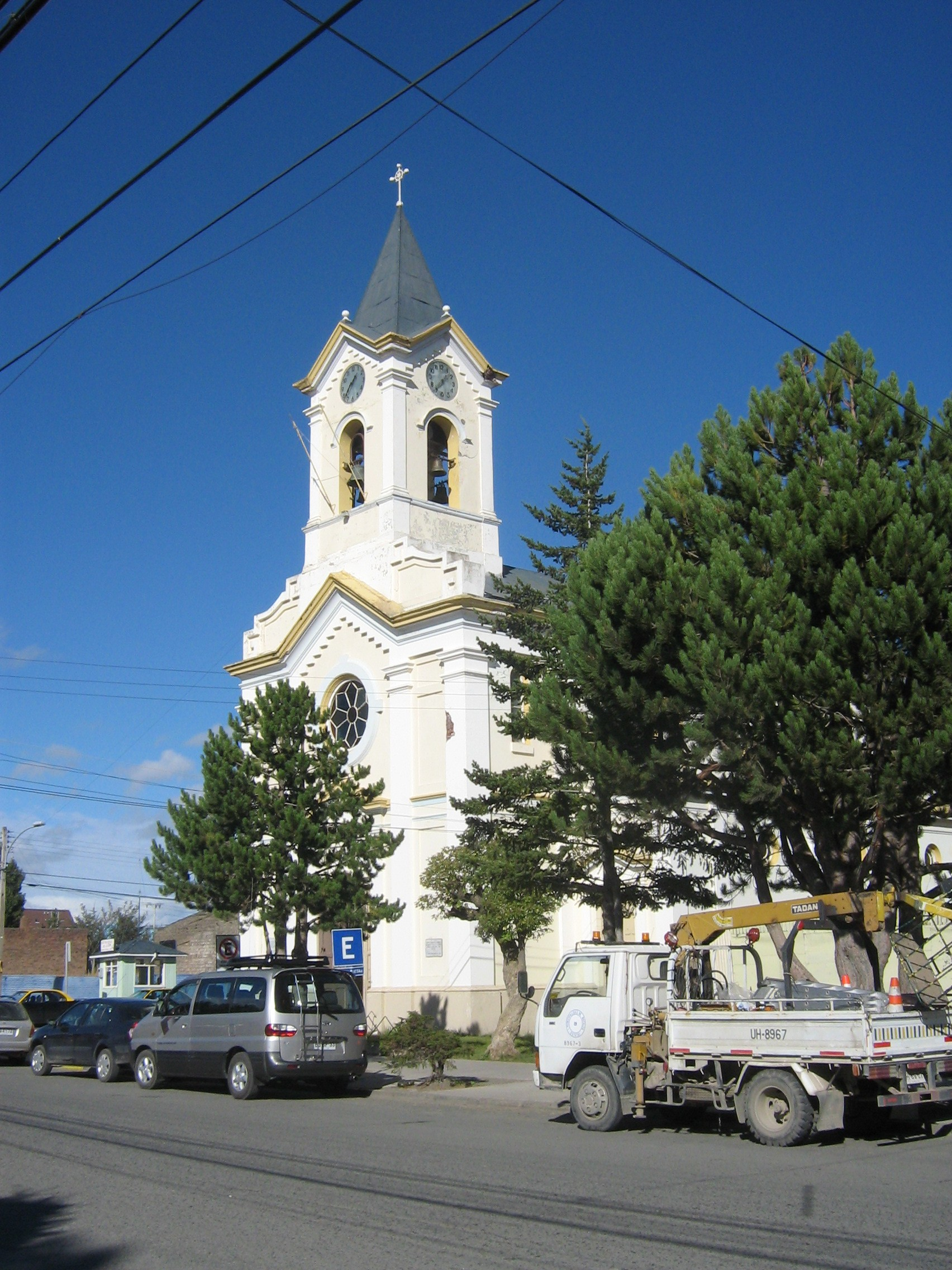 Puerto Natales, María Auxiliadora church